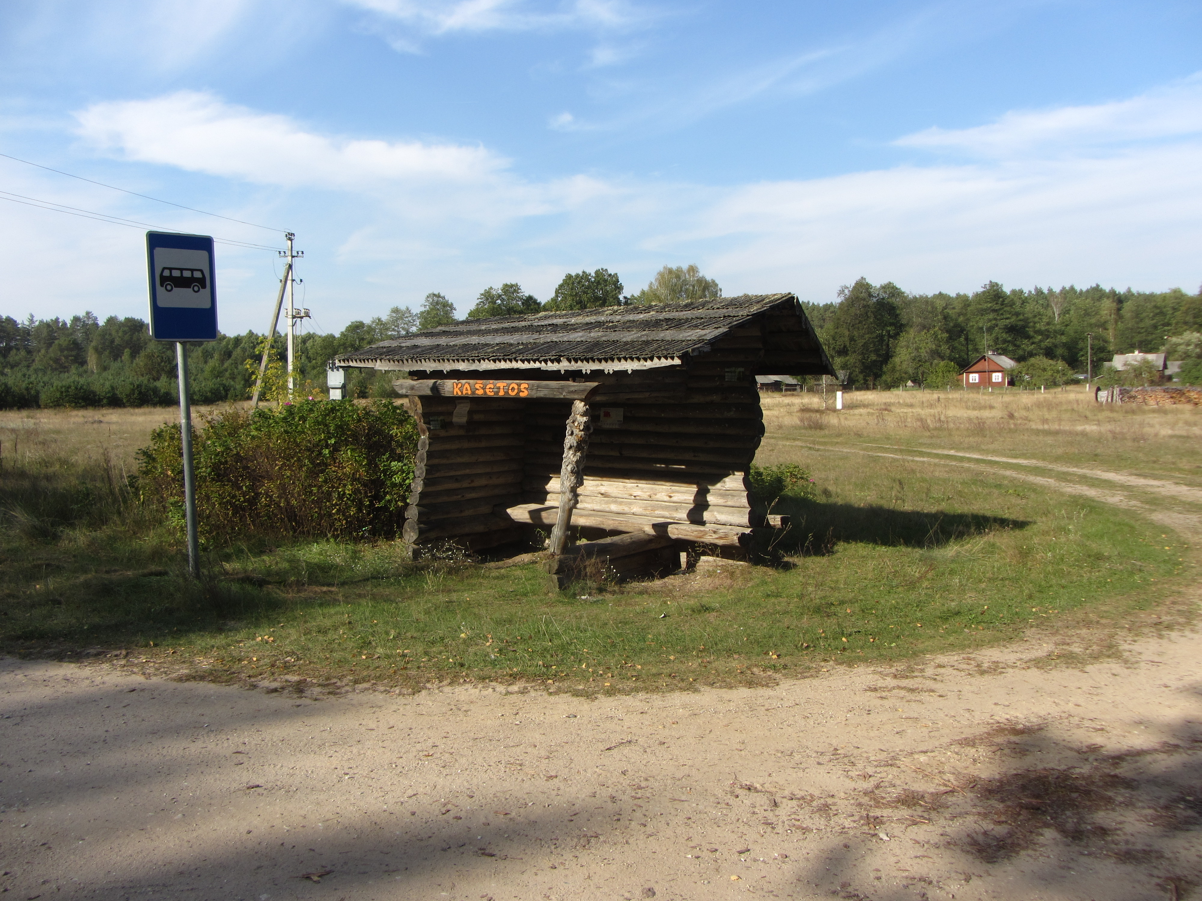 Kašėtos 65344, Lithuania